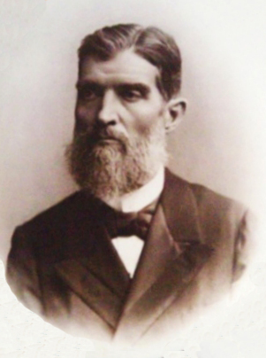 Fotografia esmaltada do presidente do Brasil Prudente de Morais.